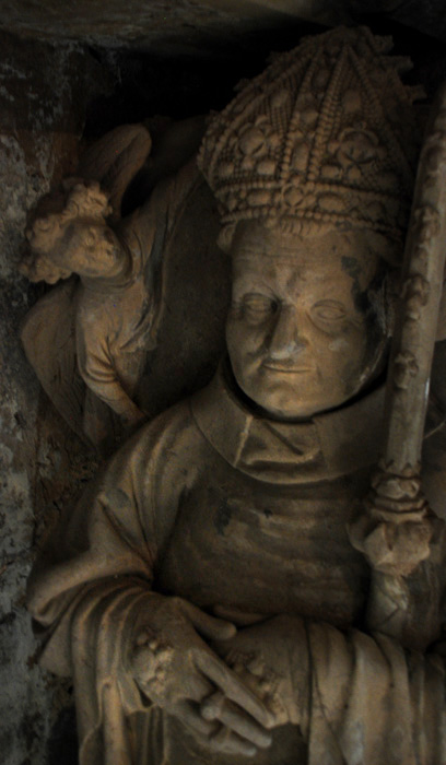 Rostro del Obispo-Cardenal Sancho Sánchez de Oteiza, de su sepulcro en la catedral de Pamplona.